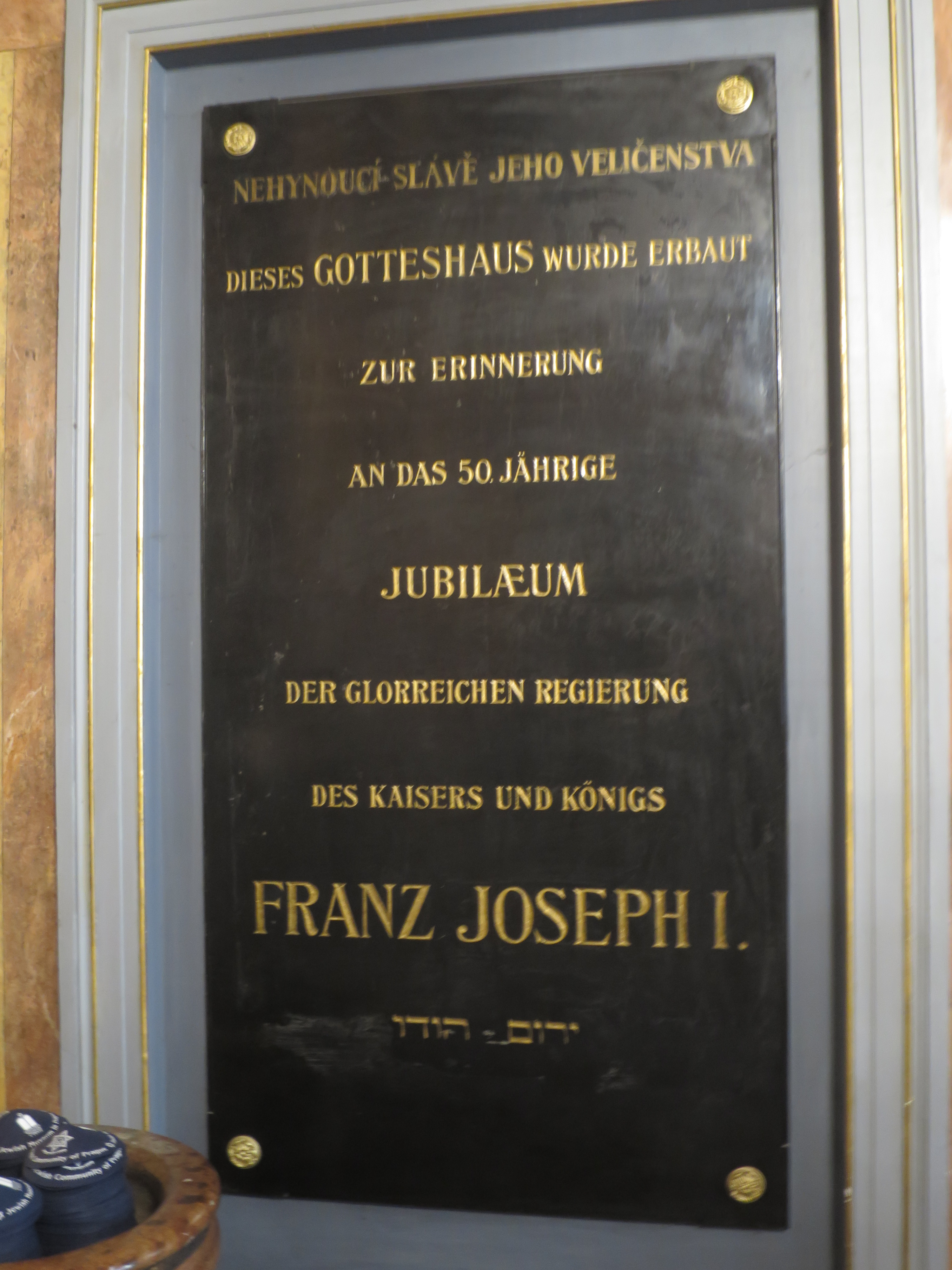 Widmungsinschrift der Jerusalemsynagoge Prag